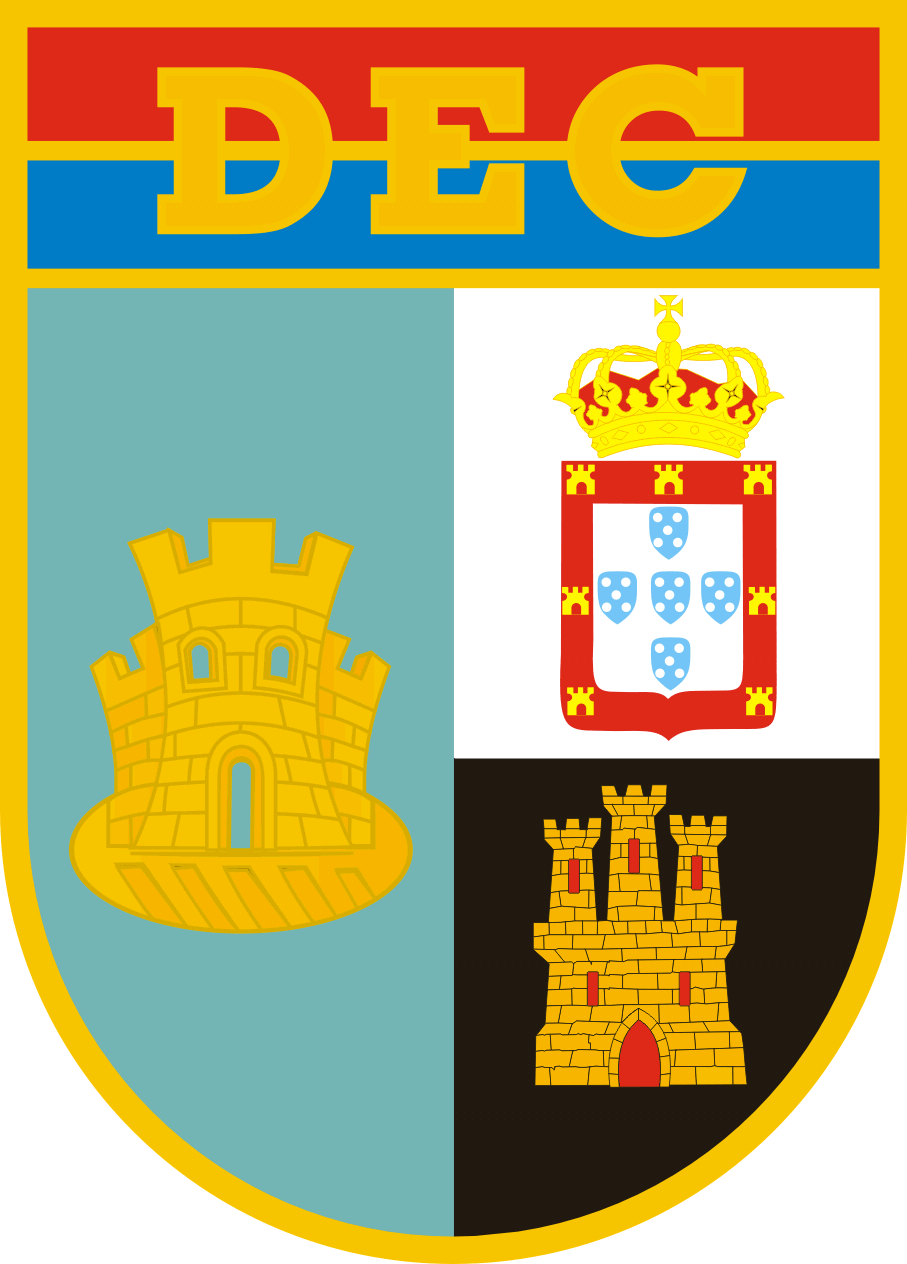 Departamento de Engenharia e Construção